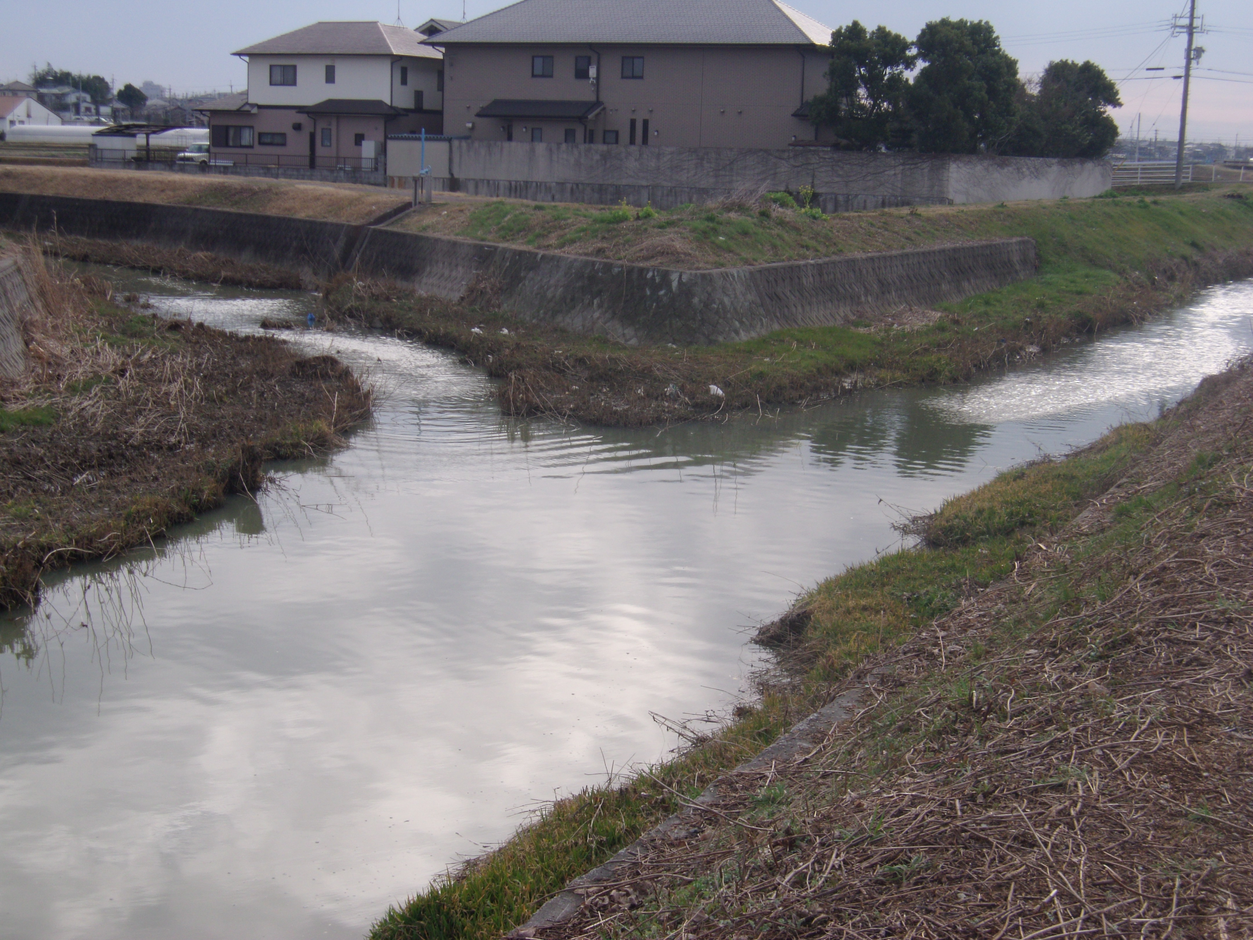 曇川（左）と支流の国安川（右）の合流点